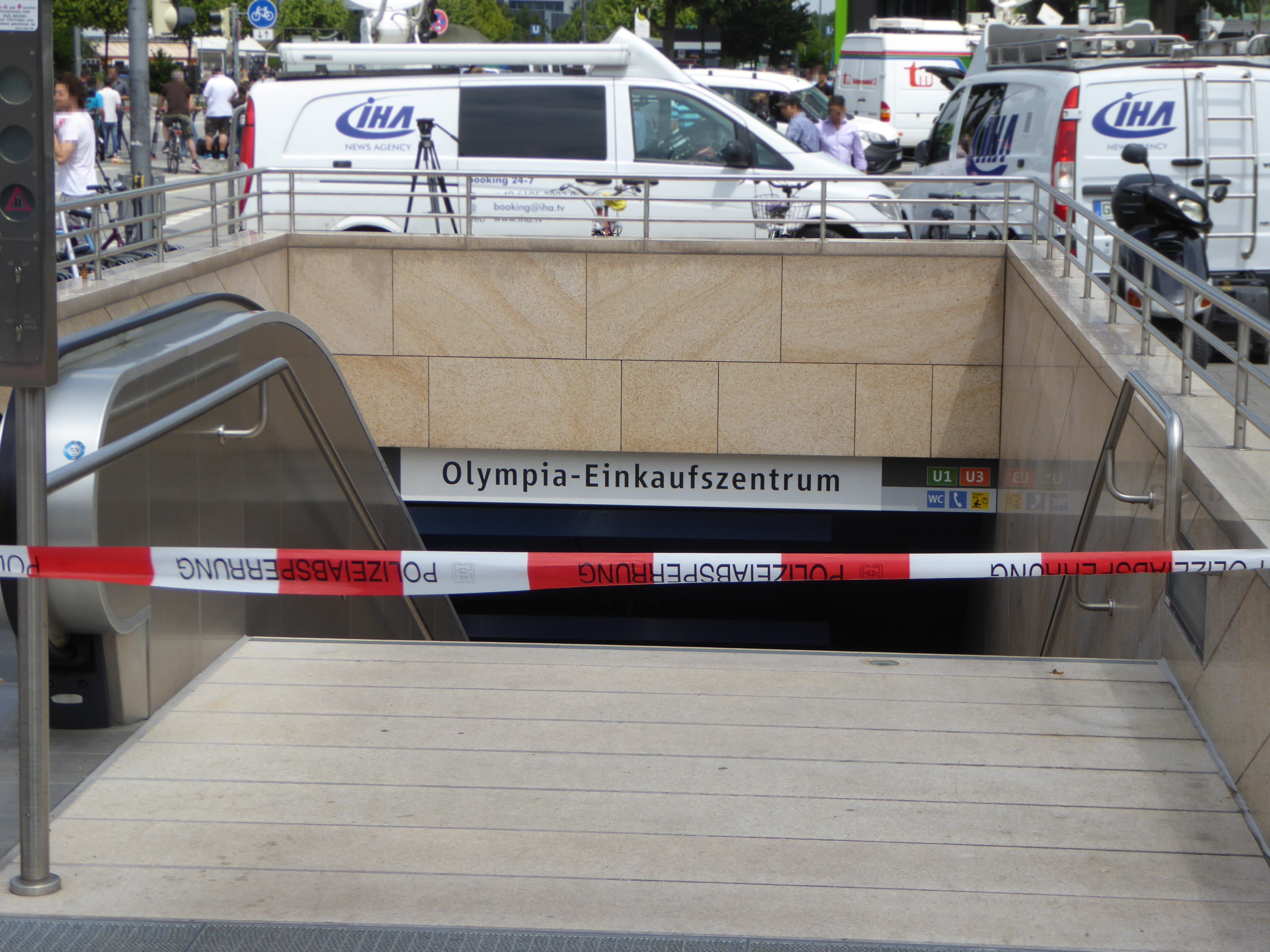 Am Tag nach dem Amoklauf vom 2016-07-22 in München ist der U-Bahnhof Olympia-Einkaufszentrum wegen polizeilicher Ermittlungen gesperrt.